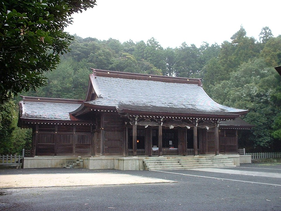 隠岐神社 2003年3月27日 Bakkai撮影 Category:神社の画像ja:Category:島根県の画像ja:Category:隠岐